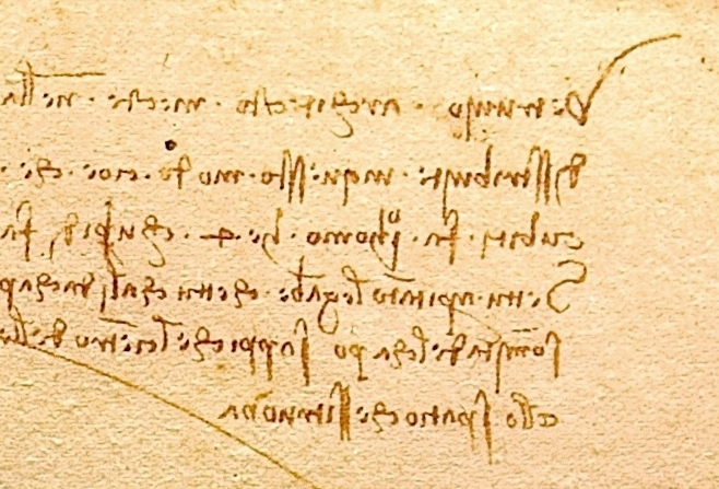 Vitruvian Man